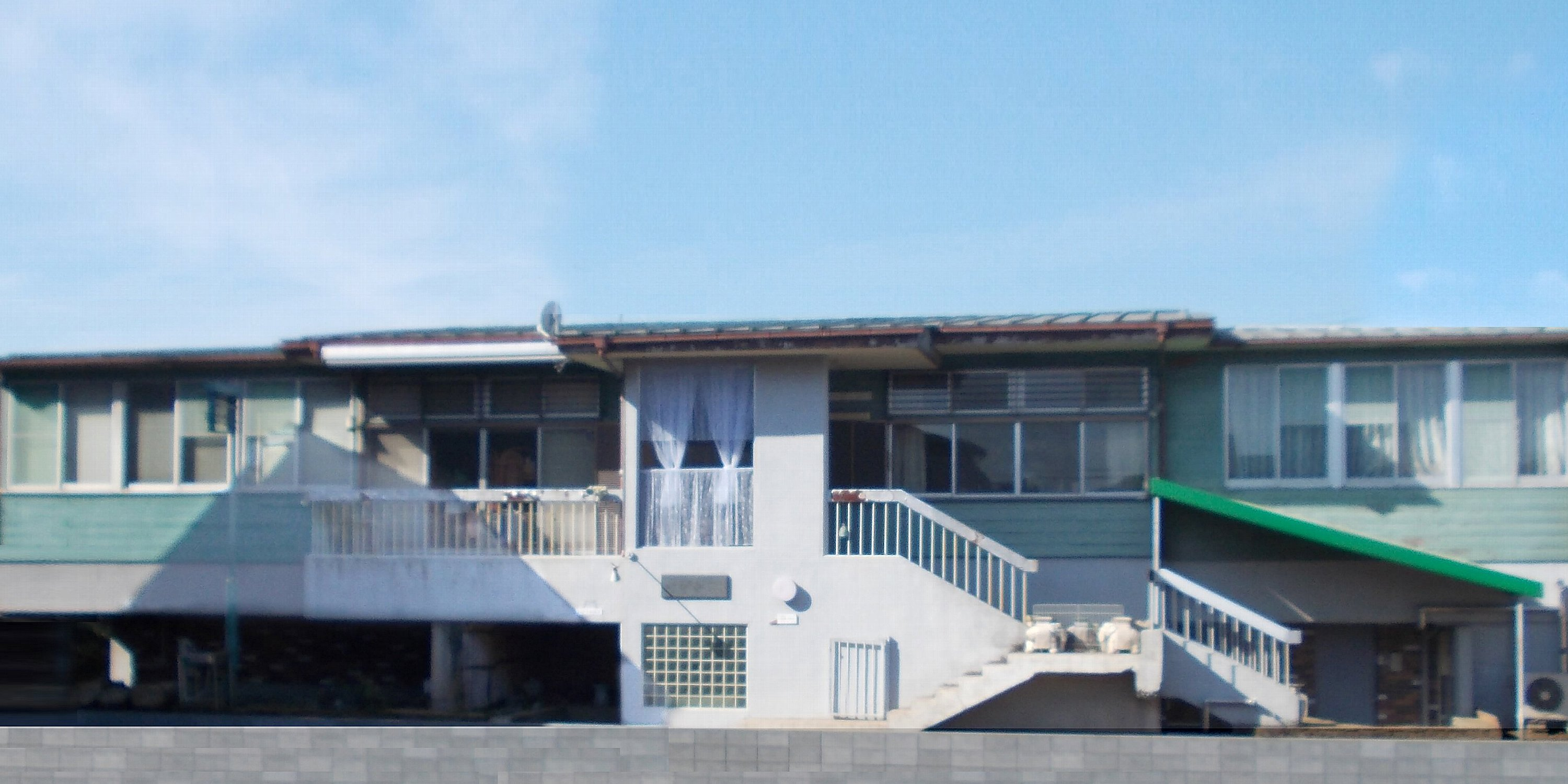 池松武之亮いびき研究所